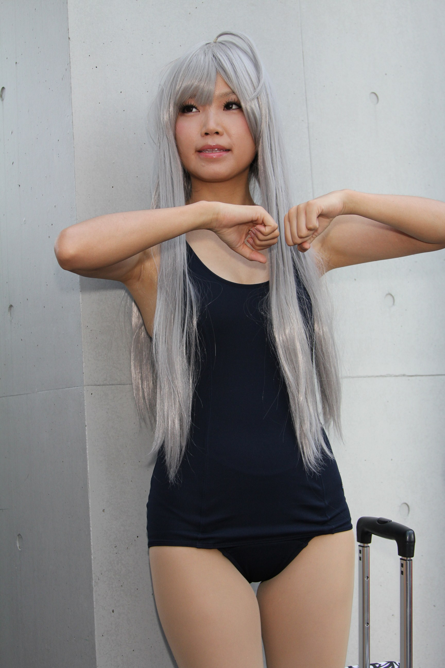 Comic Market 82，《襲來！美少女邪神》奈亞子cosplayer。